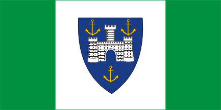 Bandera del consell de Isle of Wight, colors autonomistes, imatge pròpia